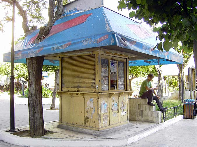 Periptero in Chania, Kreta. Ganz ohne Umbauten. Sketo, pur.